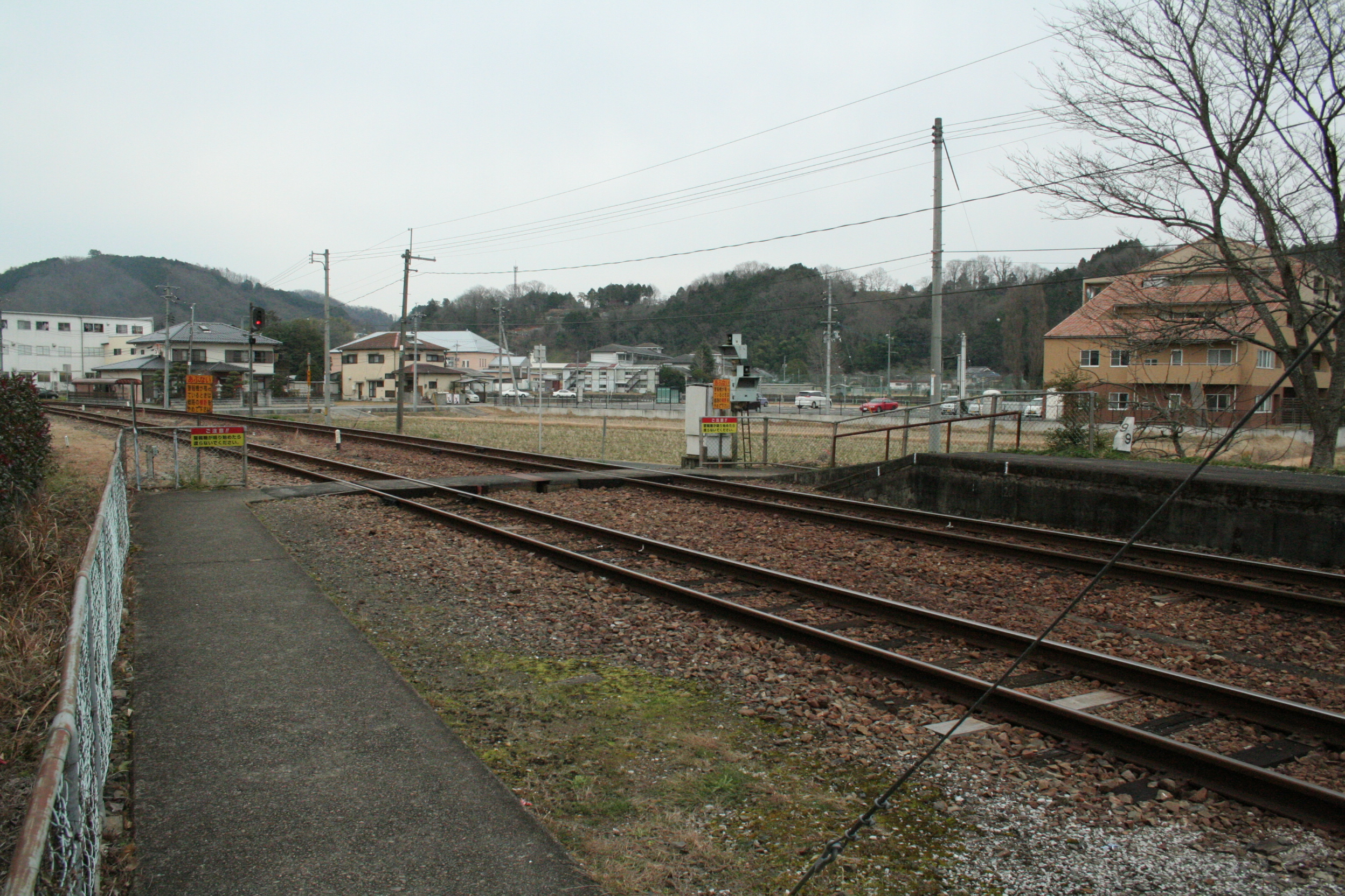 ホーム東端にある上下線ホームを結ぶ道。